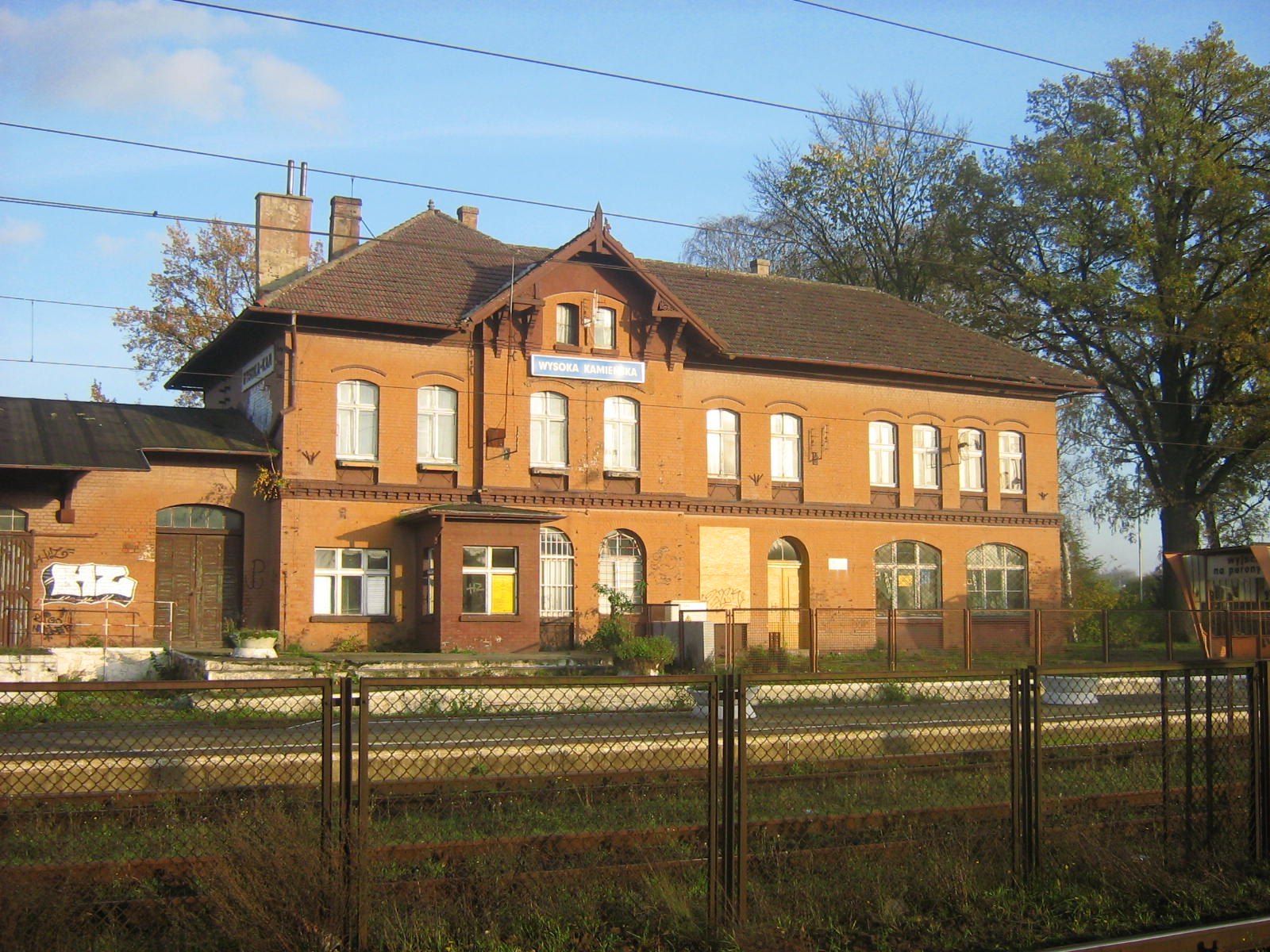 Stacja kolejowa w Wysokiej Kamieńskiej